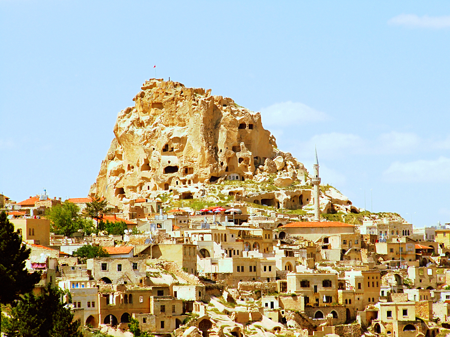 Kapadocja (Turcja), Üçhisar, skalne miasto (Cappadocia, Turkey)